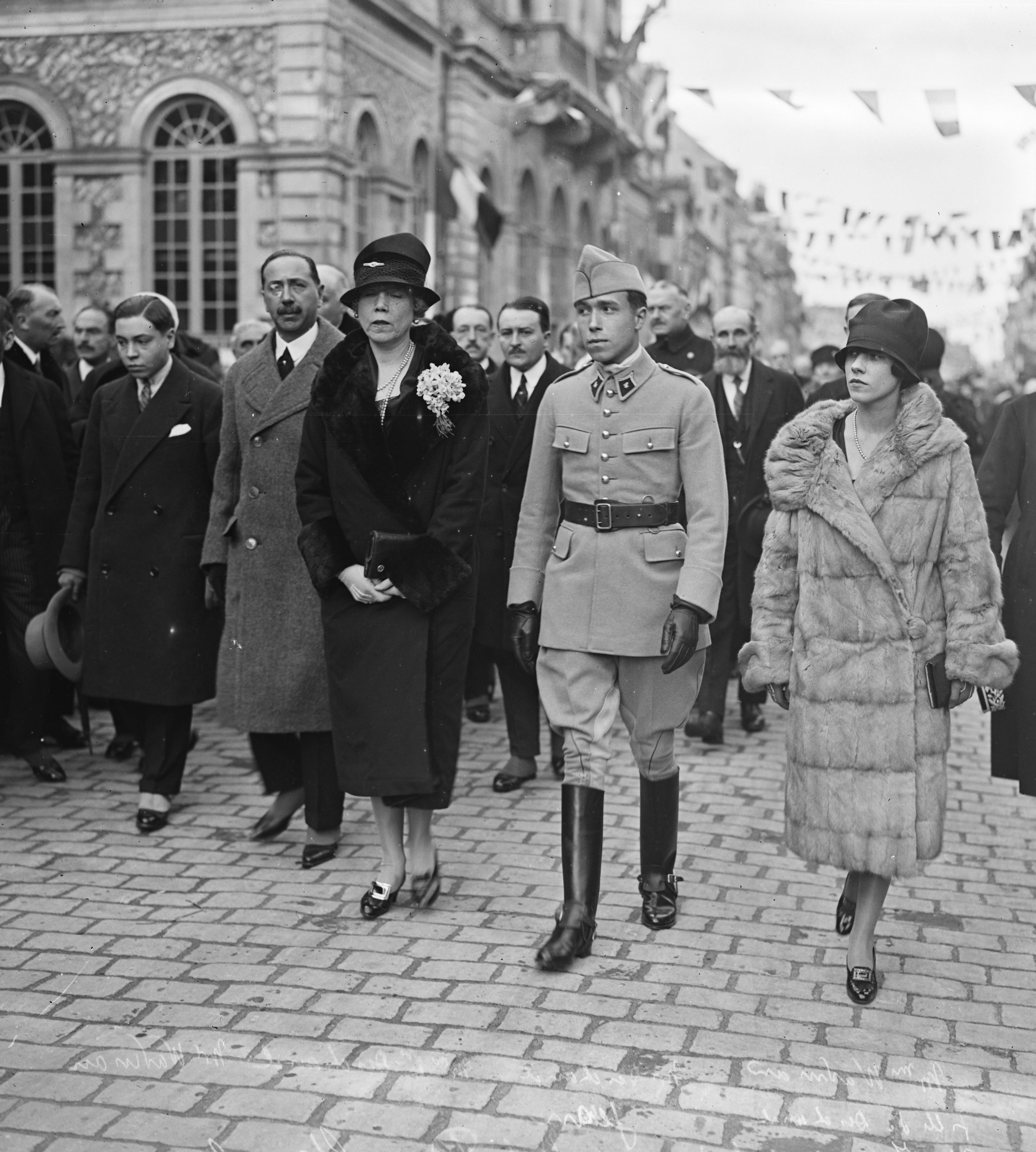 Lors de l'inauguration d'une statue représentant Paul Deschanel à Nogent-le-Rotrou, de gauche à droite : Louis-Paul Deschanel (fils de Paul), Henry Waldmann (gendre de Paul Deschanel), Germaine Deschanel (veuve de Paul), Jean Deschanel (fils de Paul) et Renée-Antoinette Waldmann (fille de Paul Deschanel).